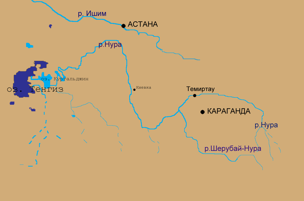 озеро Тенгиз и река Нура